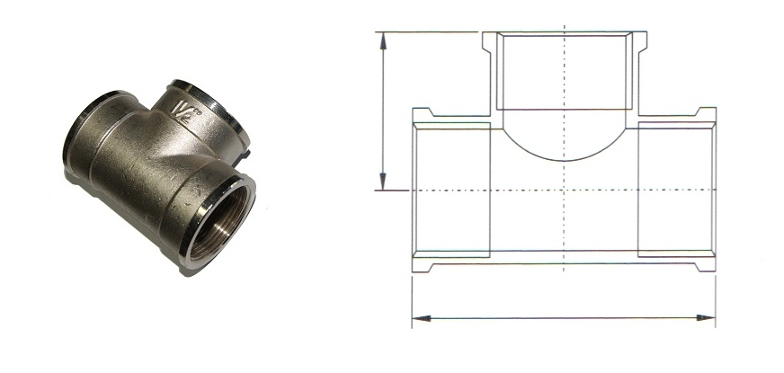 Тройник - сантехнический фитинг